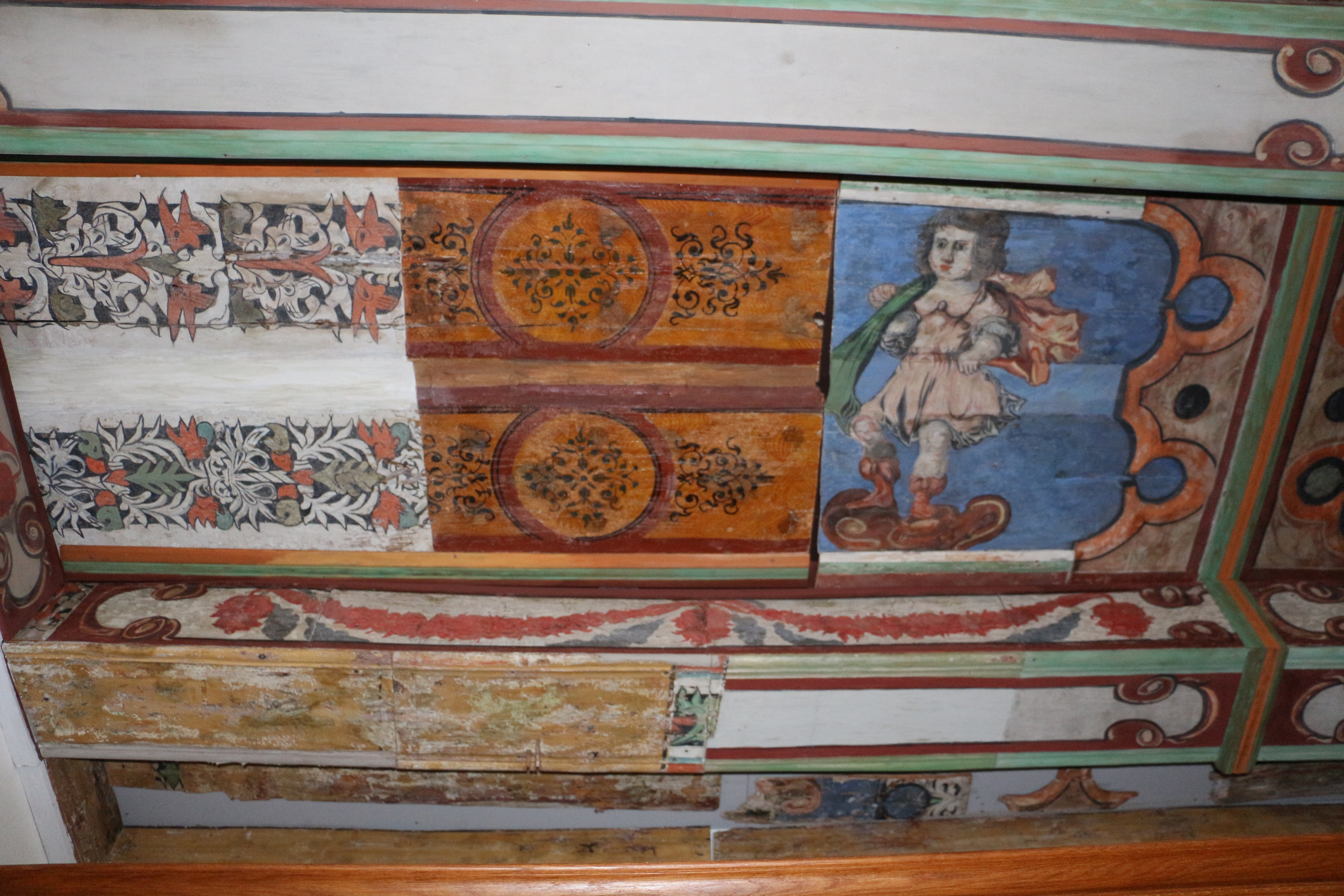 Deckenmalerei im Hoghehaus, Koberg 2, in Lübeck aus verschiedenen Epochen (links: Gotik, mitte: Renaissance, rechts: Barock)